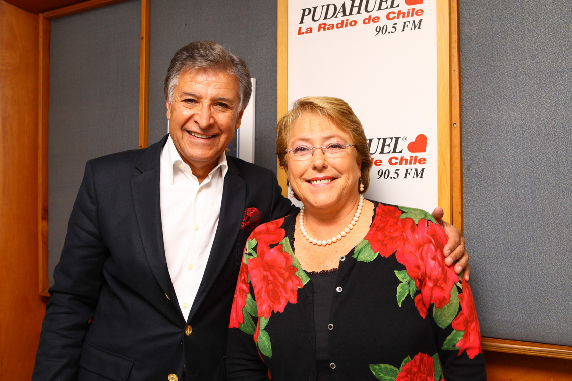 Entrevista a Michelle en Radio Pudahuel 25/11/2013